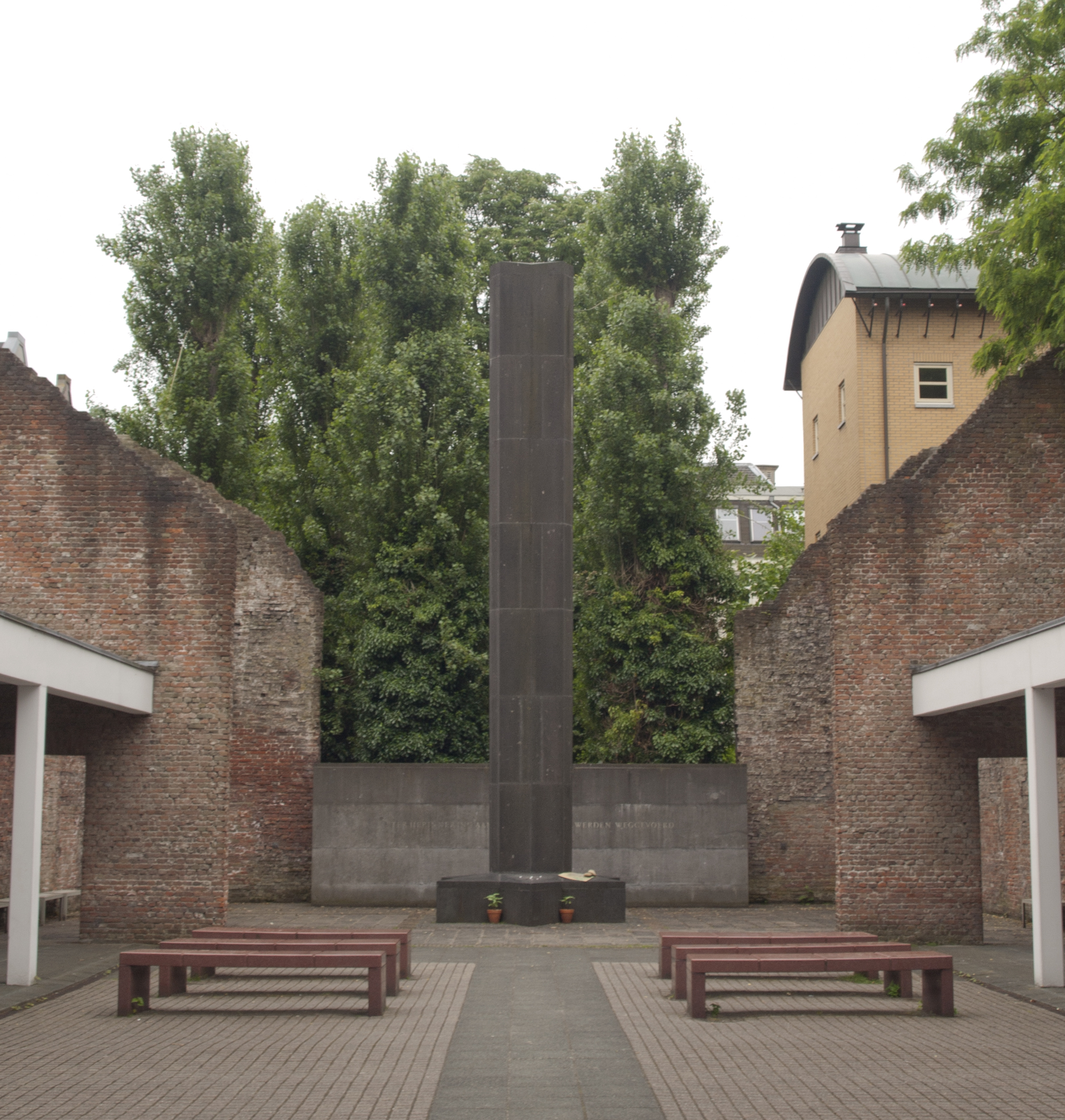 Amsterdam, Mahnmal in der Gedenkstätte Hollandsche Schouwburg